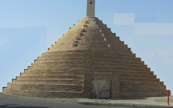 مزومبل (اب انبار) شهذ سرخه در استان سمنان